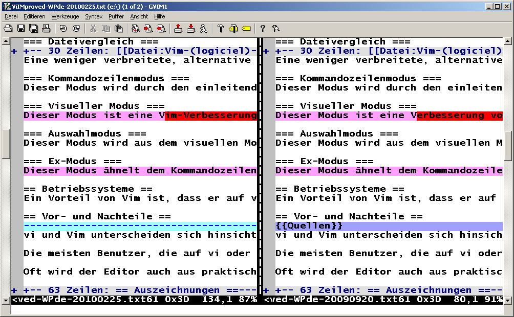 gVim mit der Funktion Dateivergleich, Aufruf: "gvim -Od Datei-Version1 Datei-Version2" (dabei bedeuten die Optionen: -O = stelle Dateien in vertikal geteilten Fenstern dar, -d = "Diff Modus", zeige Unterschiede zwischen den Versionen). Änderungen sind rot hervorgehoben. Fehlende Zeilen sind hellblau mit Strichen gekennzeichnet. Bereiche, die in beiden Versionen gleich sind, werden mit "+-- XY Zeilen: ..." grau unterlegt markiert und über die Funktion der Faltung ausgeblendet.